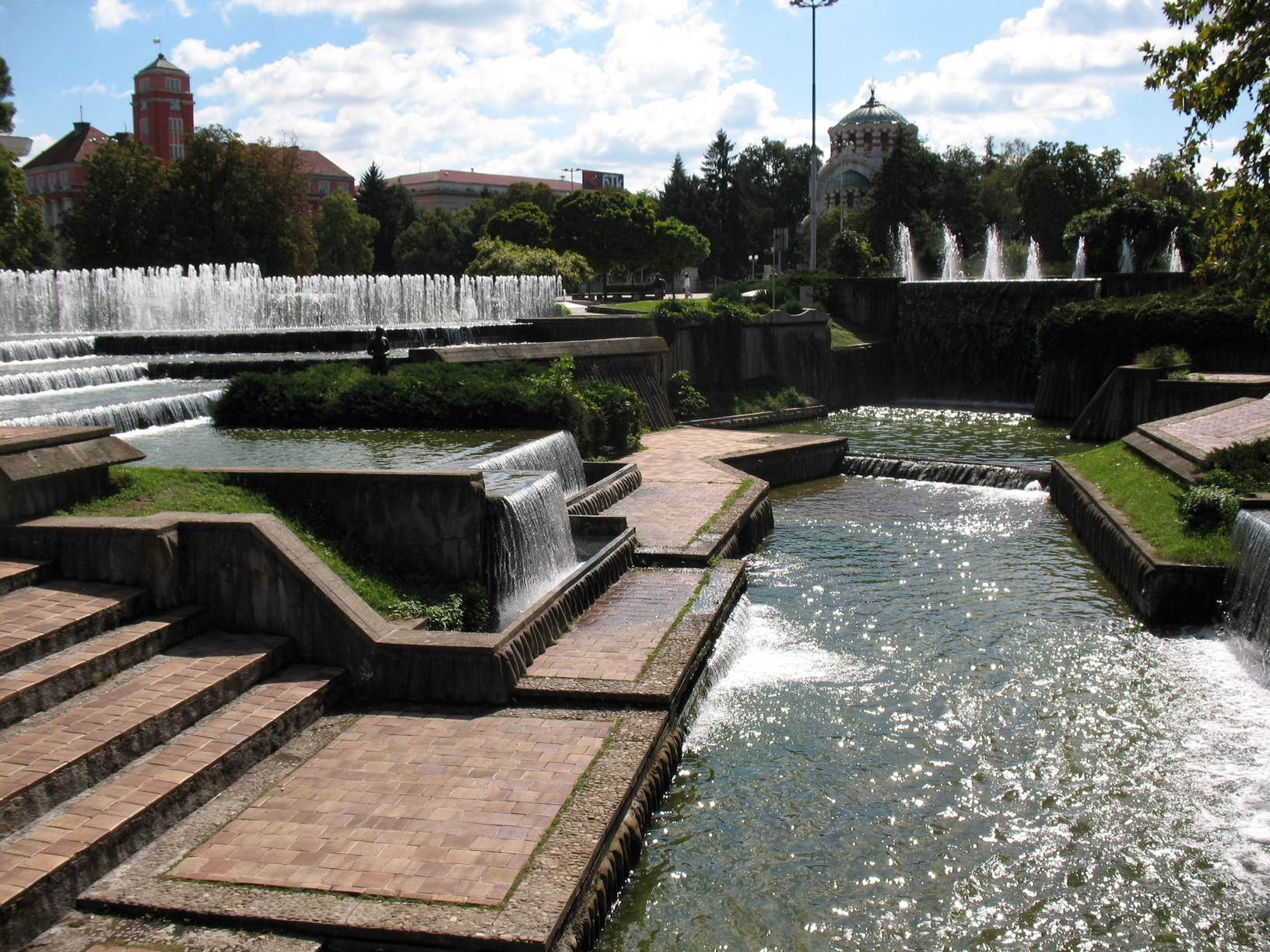 Water cascade, Pleven